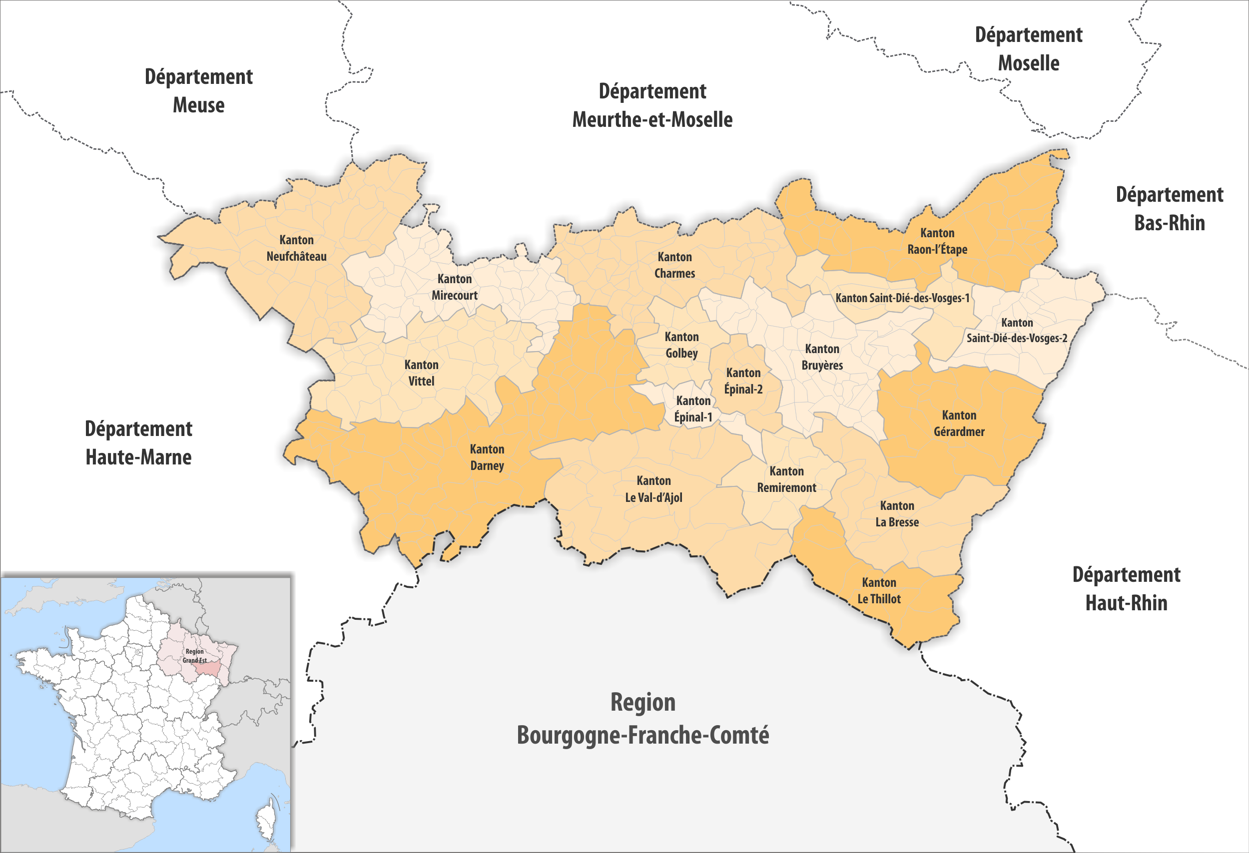 Gemeinden und Kantone im Departement Vosges